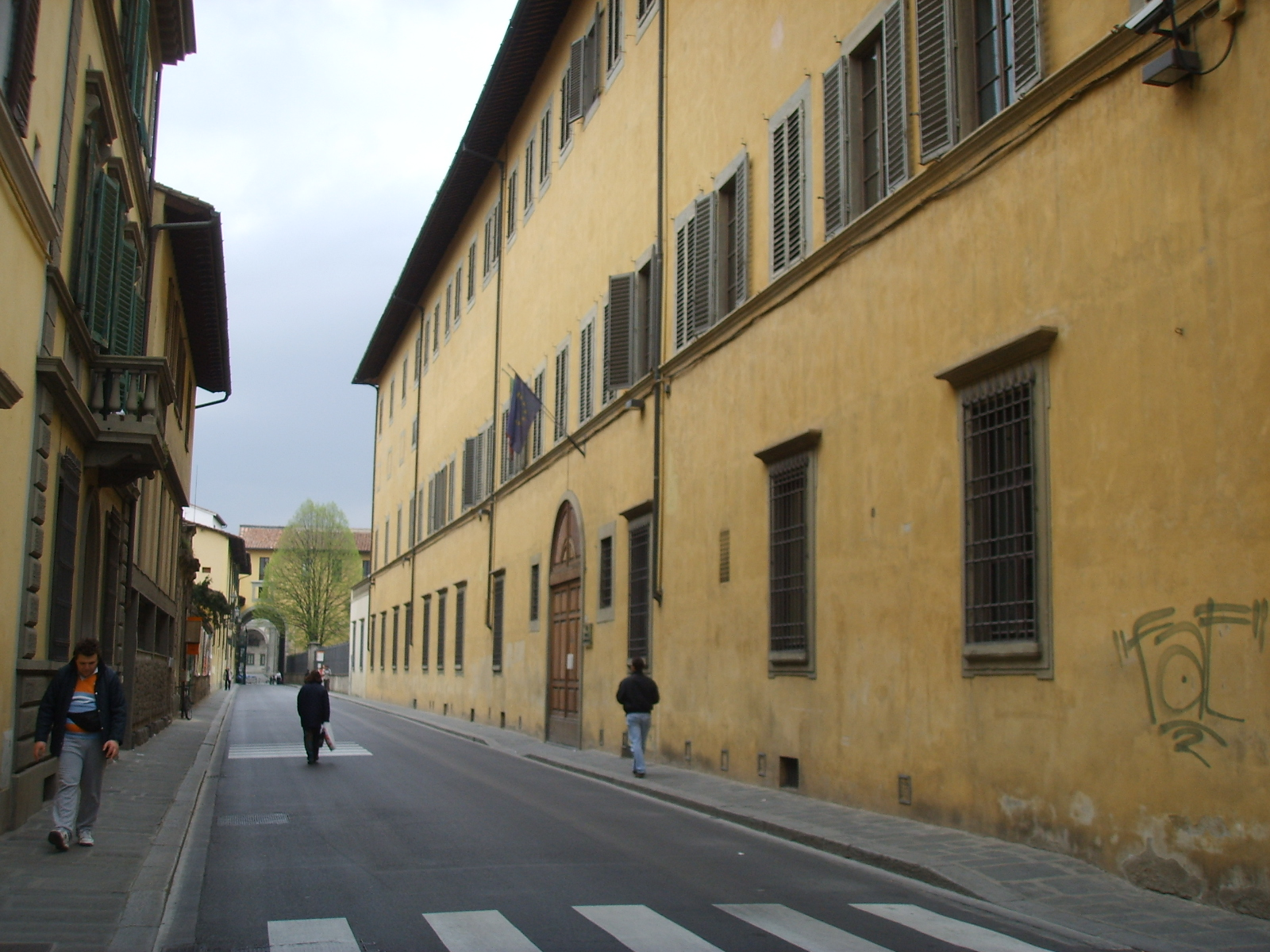 Via della colonna